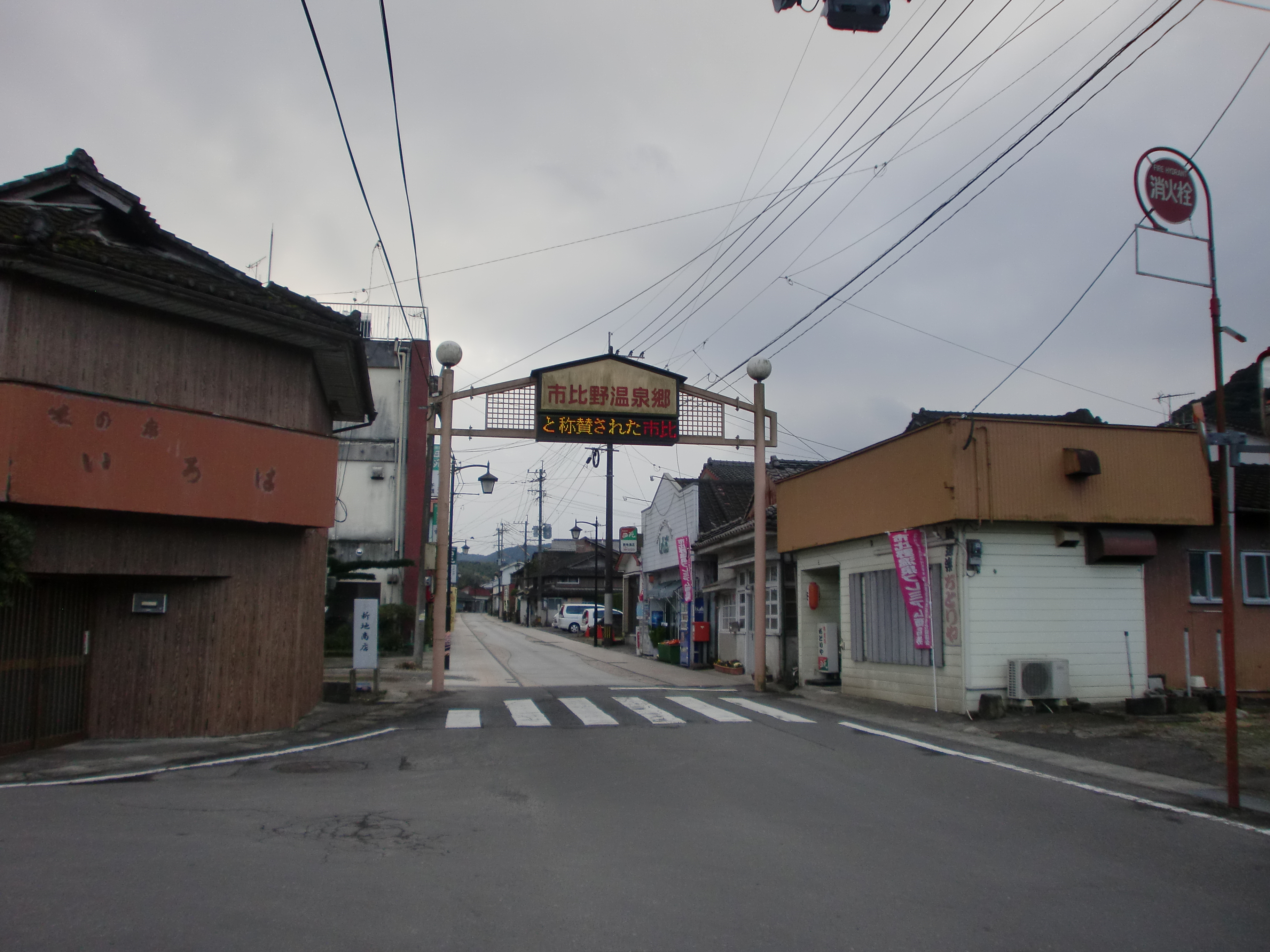 市比野温泉（鹿児島県薩摩川内市）